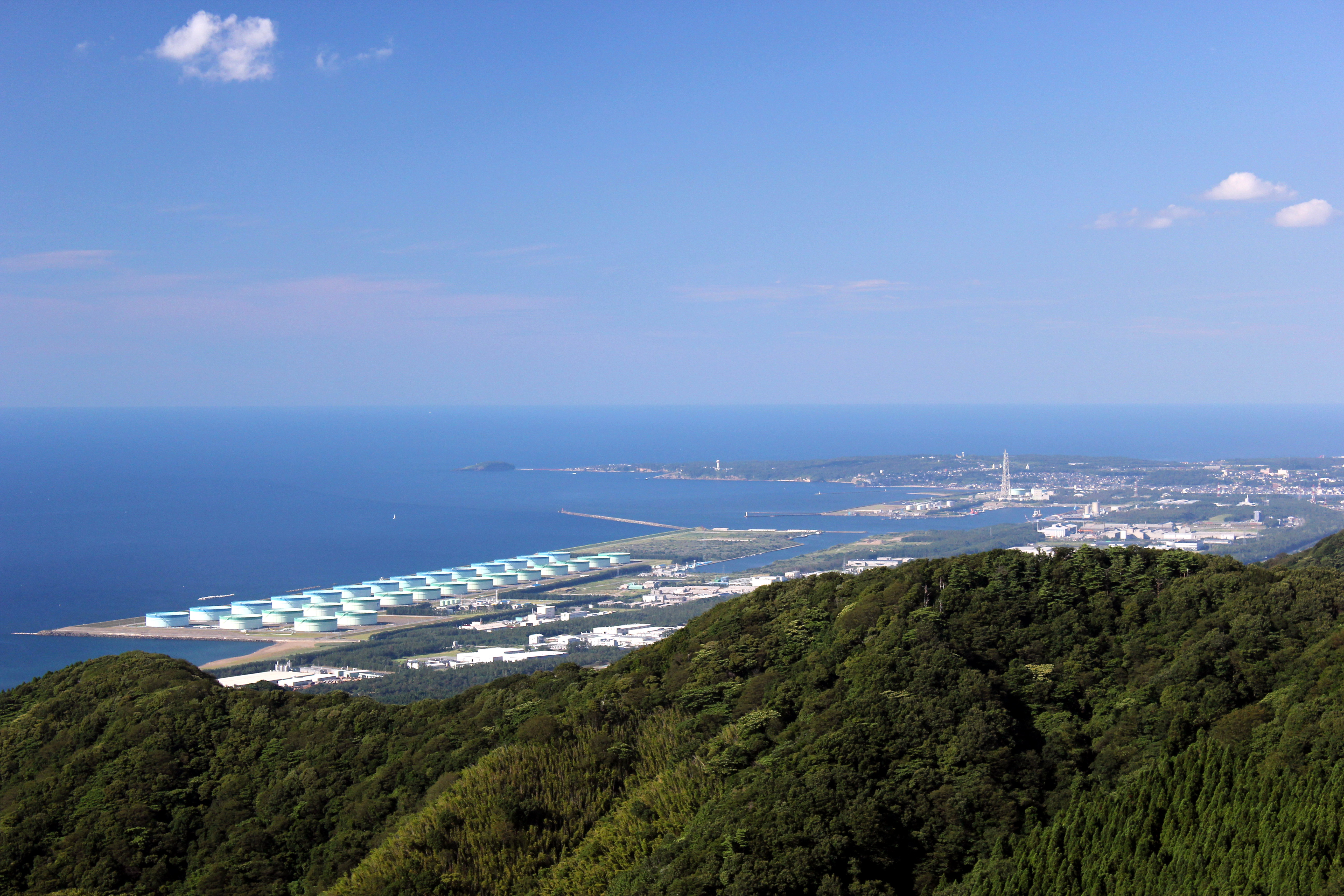 国見岳よりテクノポートを望む